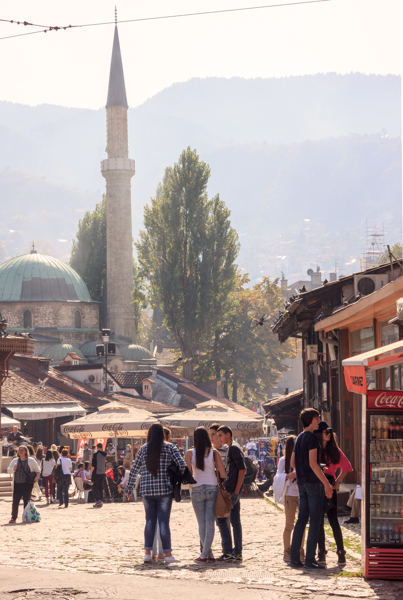 Savajevo-Old-Town-3